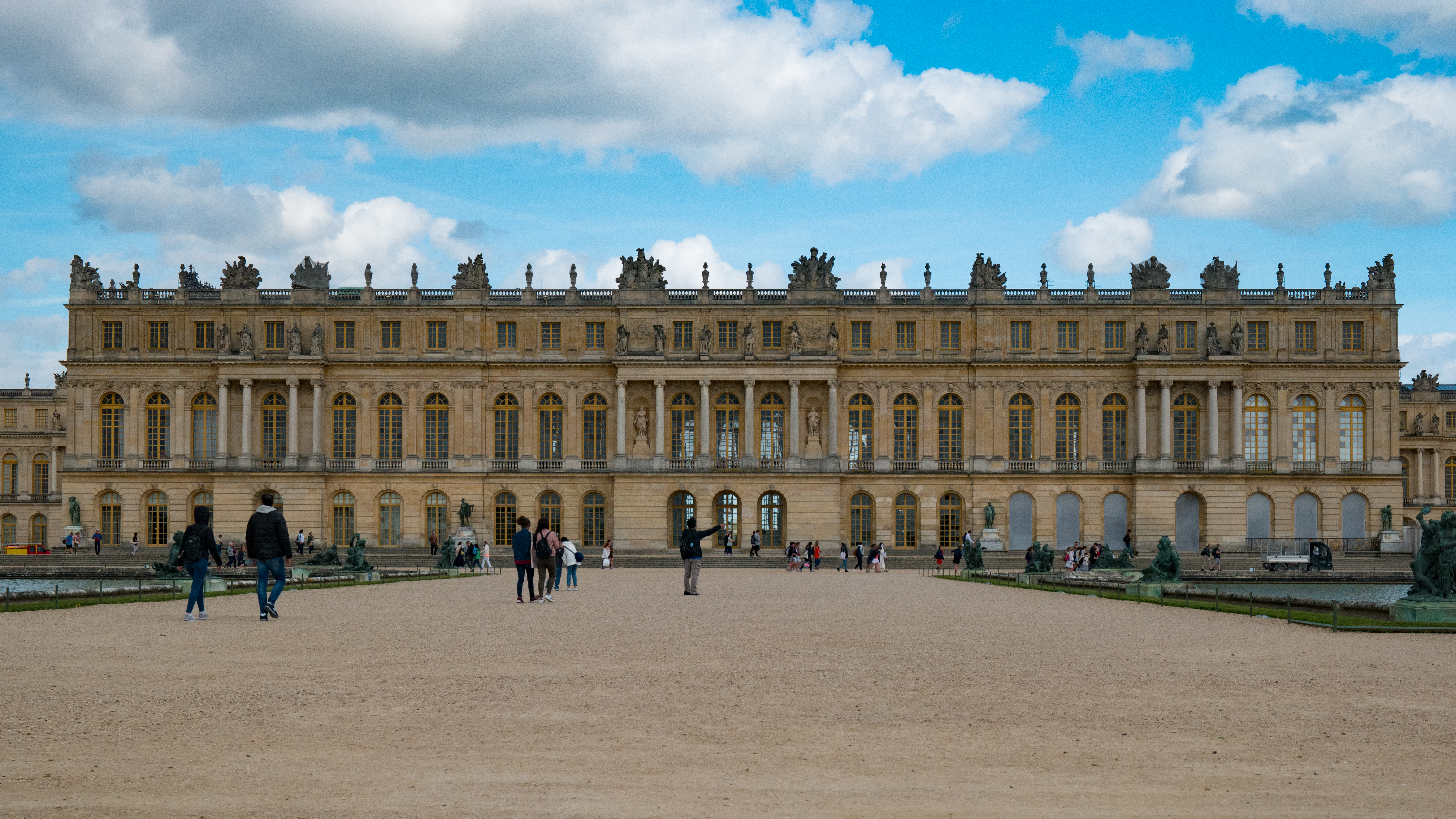 Versailles